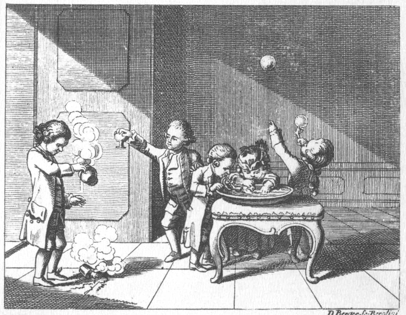 Anfang des menschlichen Verstandes. d) Vermehrung der Erfahrenheit durch den Trieb, allerlei zu versuchen. Das Spiel mit Seifenblasen. Die Umkehrung eines vollen Glases mit einem engen Halse. Die versuchte Löschung des Feuers durch heißes Wasser. (Beschreibung lt. Quelle)